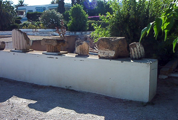 fragments de colonnes, "quartier Magon" de Carthage